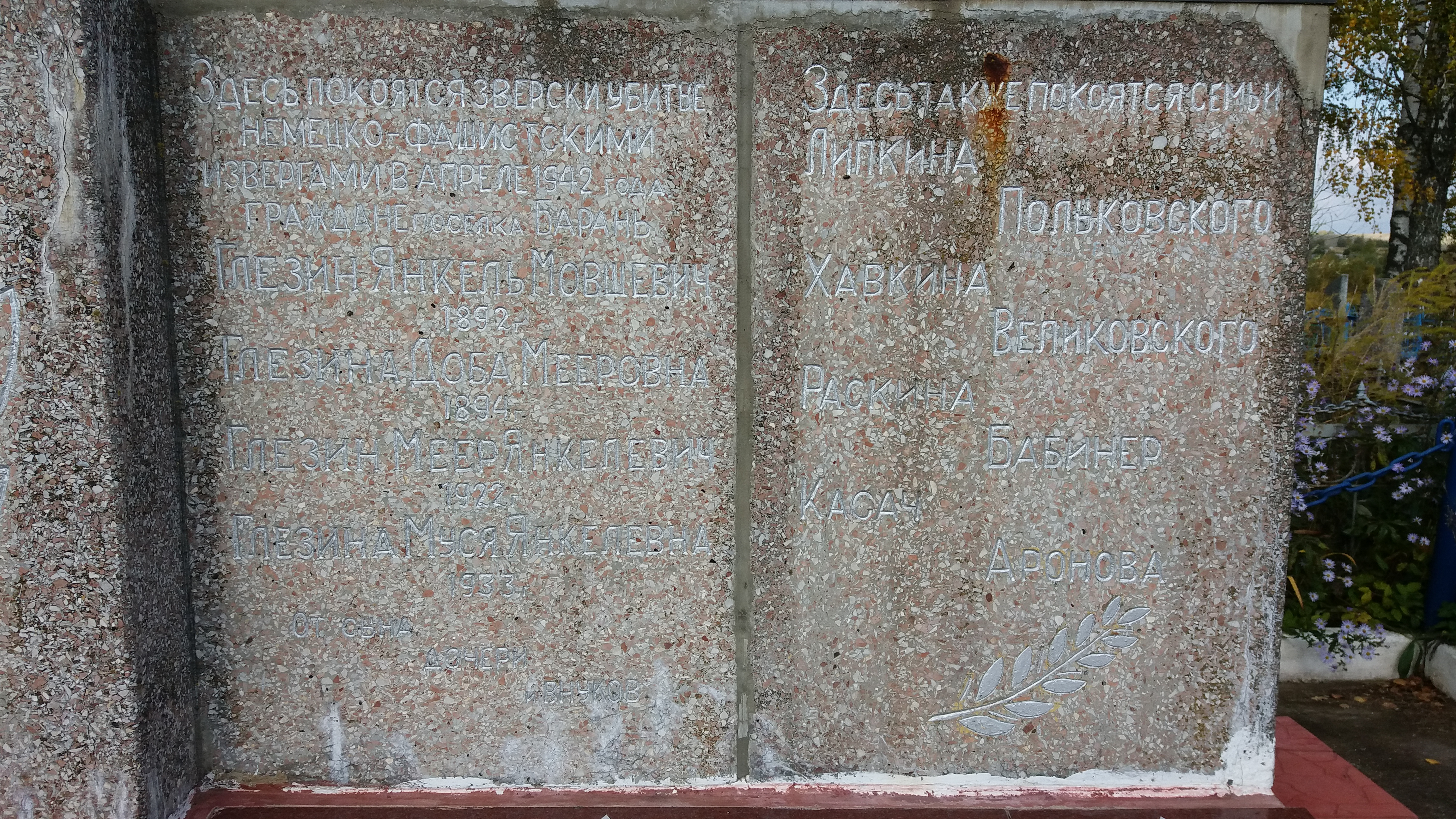 Памятник на месте убийства нацистами 8 апреля 1942 года евреев - узников гетто города Барань Оршанского района. Находится на территории городского кладбища недалеко от входа, в 300 метрах от улицы Сорокина.